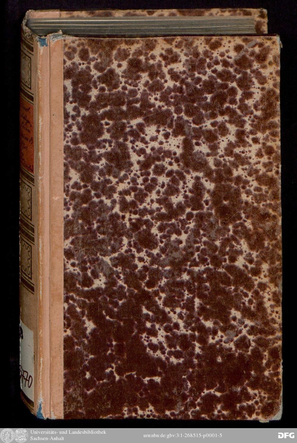 Česky: Svazek Atlas Silesiae